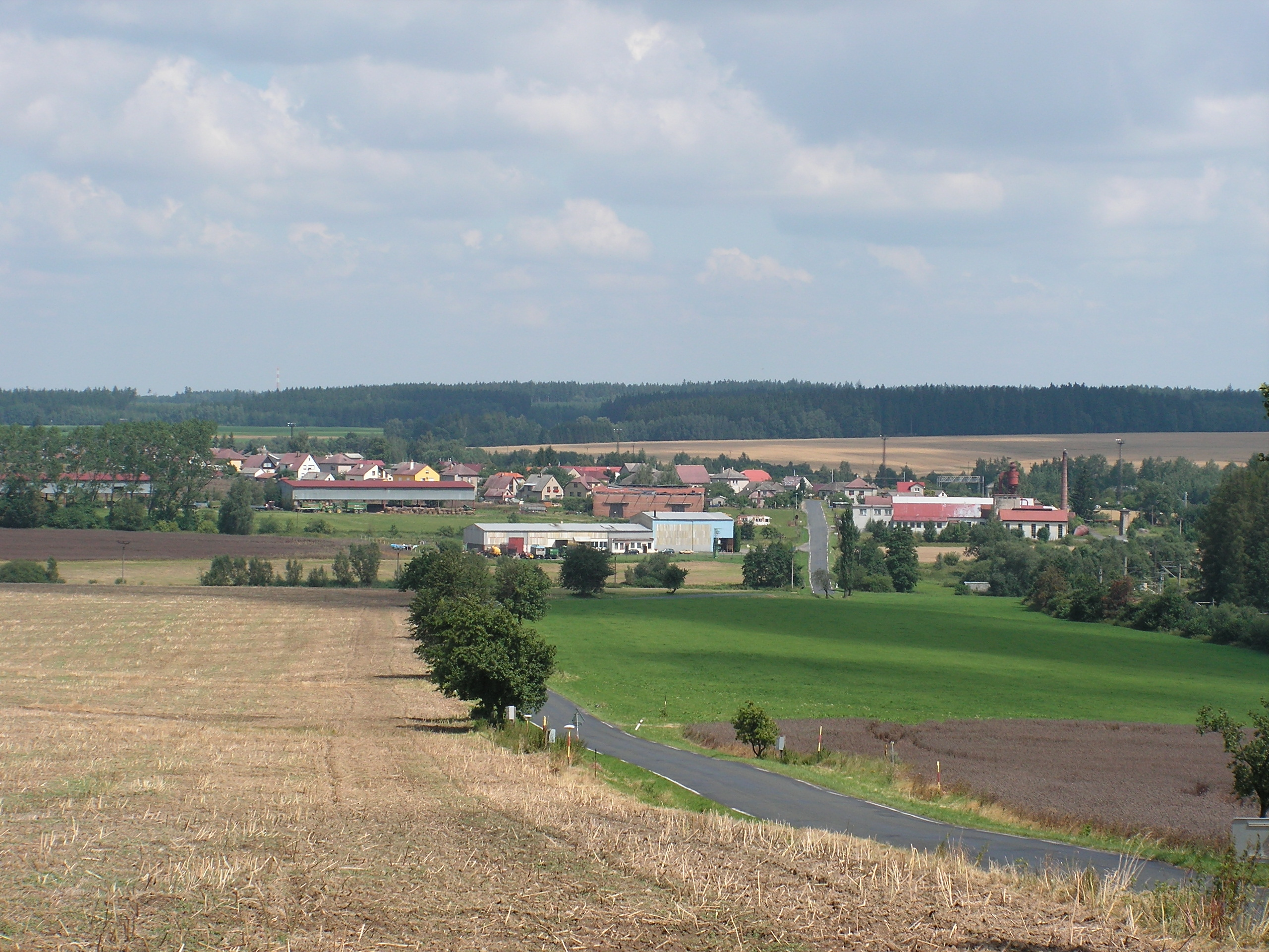 Pohled na Leštinu od Vrbice